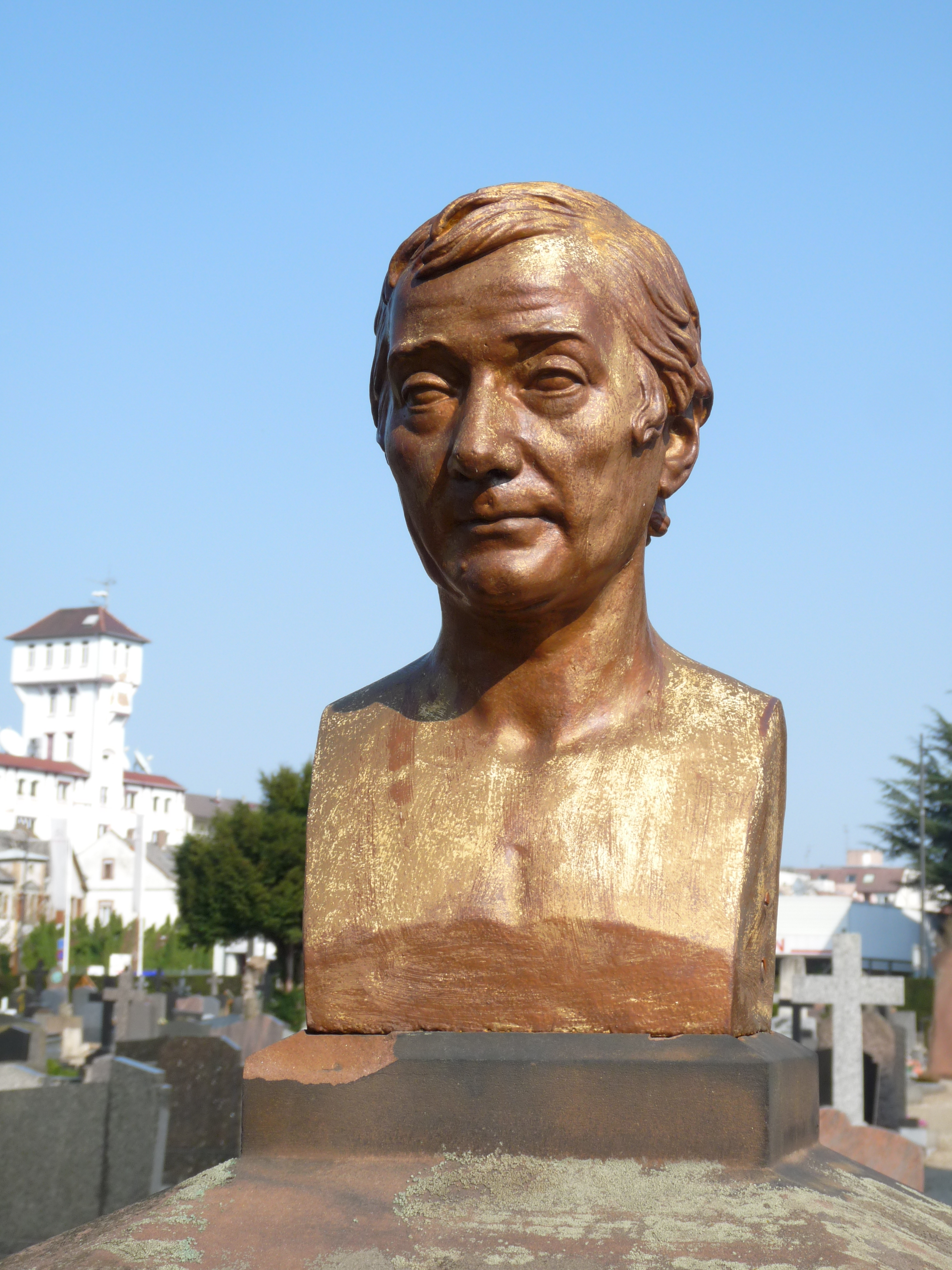 Buste de Jean-Baptiste Schwilgué au cimetière Sainte-Hélène de Strasbourg. Le monument est l'oeuvre d'André Friederich.